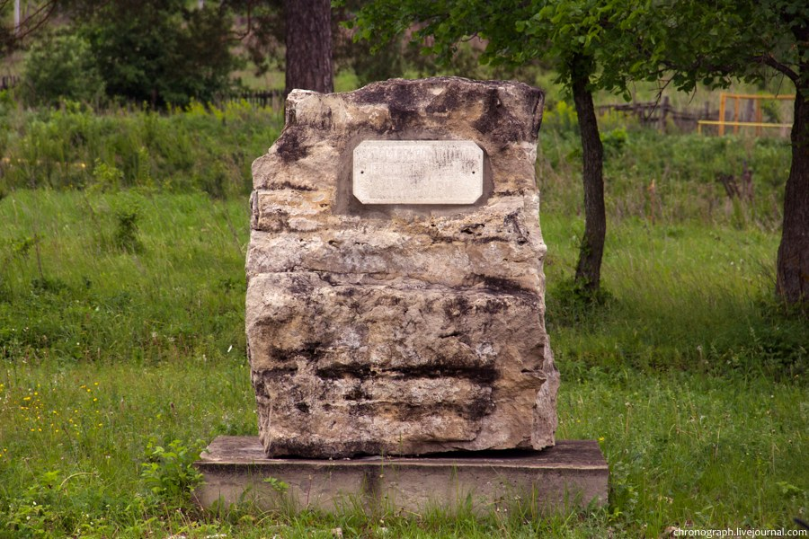 Памятный знак первым исследователям Жигулей. Жигулёвский заповедник.